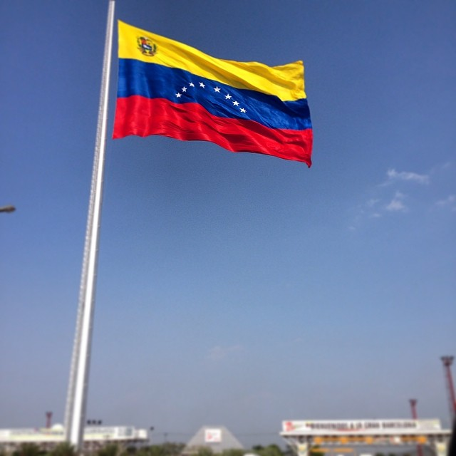 Bandera de Venezuela en el peaje